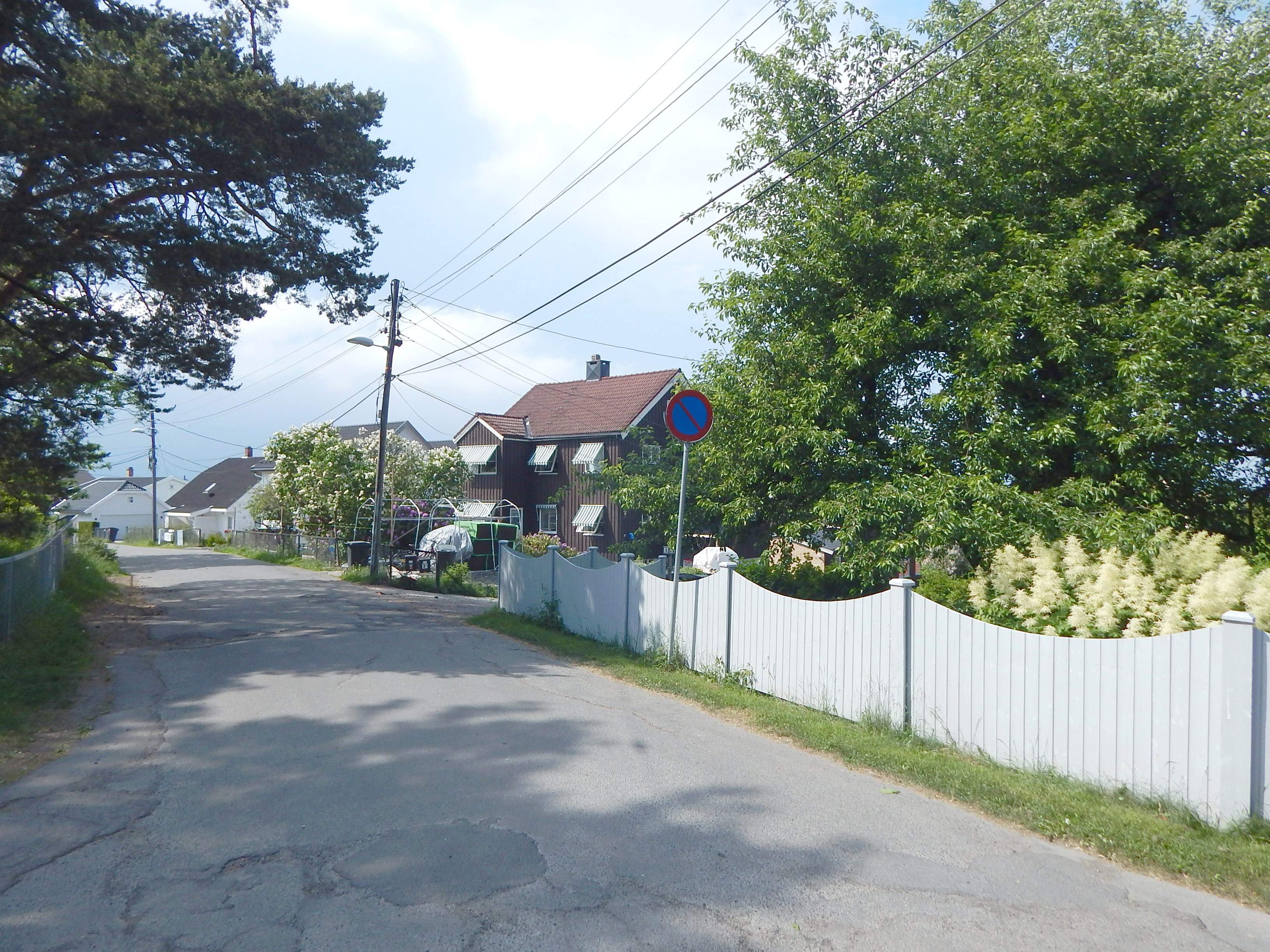 Steinborgveien sett fra Kildals vei